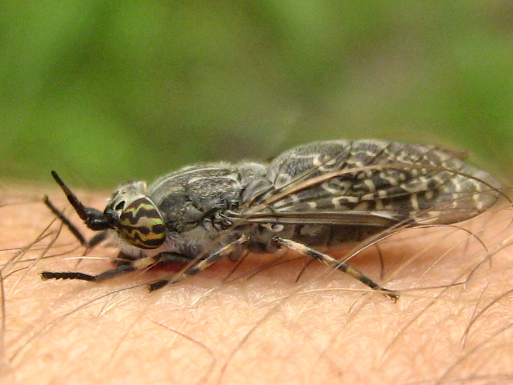 Haematopota pluvialis, die „Regenbremse“ oder „Blinde Fliege“. Früher wurde sie wiss. Chrysozona pluvialis L. genannt. Fotografiert in einem Wald bei Nauen (Brandenburg)